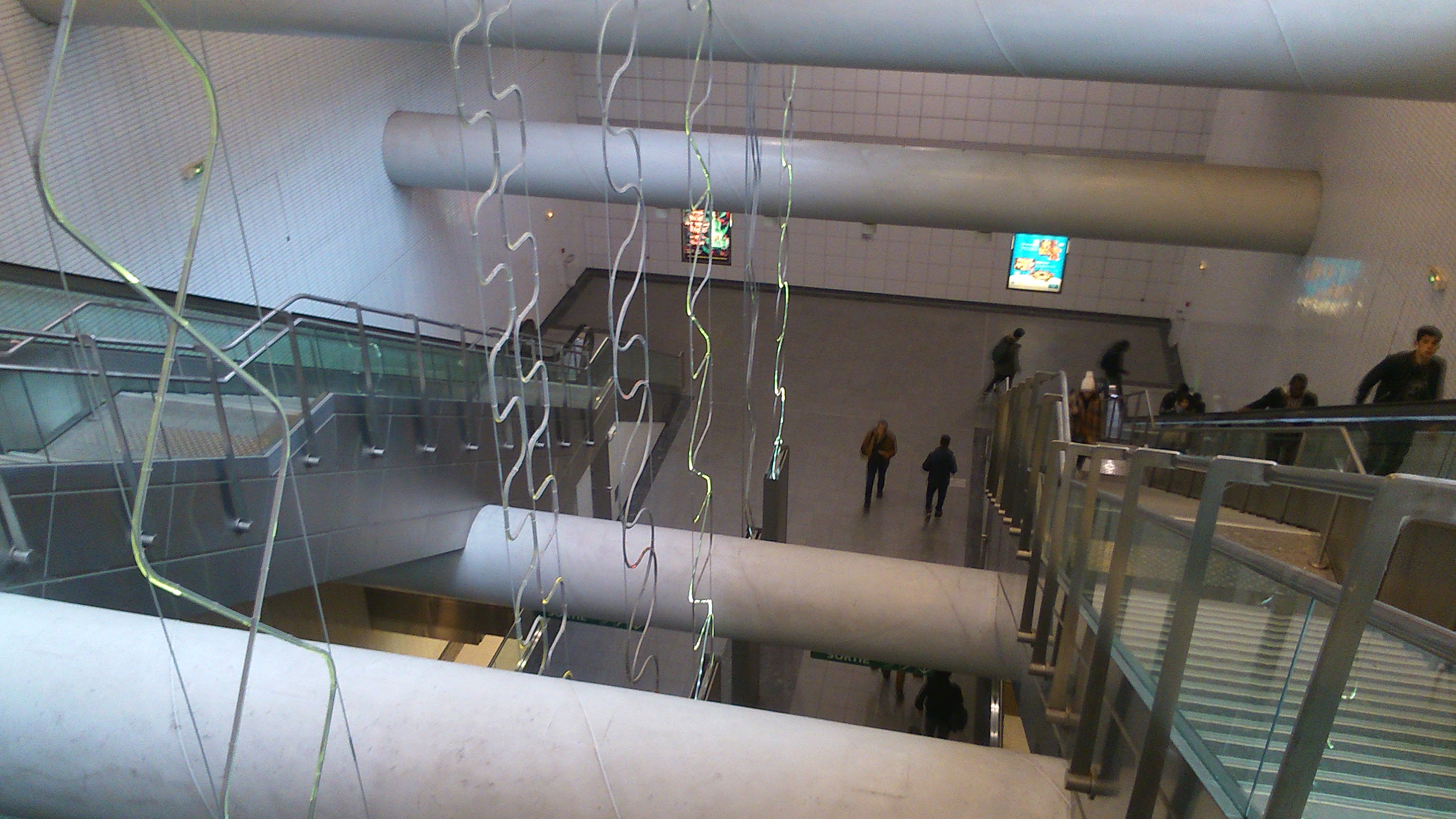 Oeuvre de la station Empalot de la ligne B du métro de Toulouse